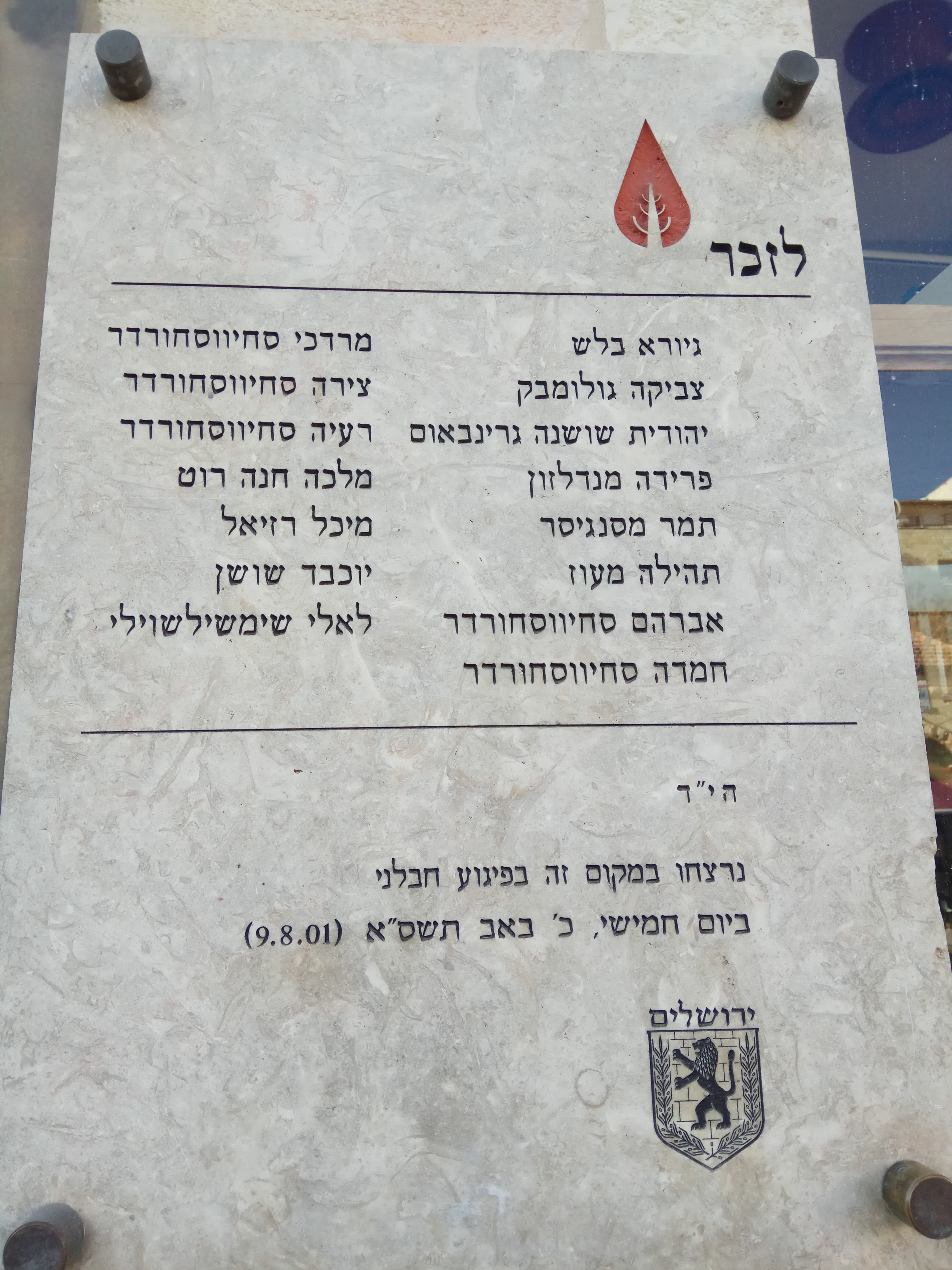 לוחית זיכרון לנרצחים בפיגוע במסעדת סבארו בירושלים